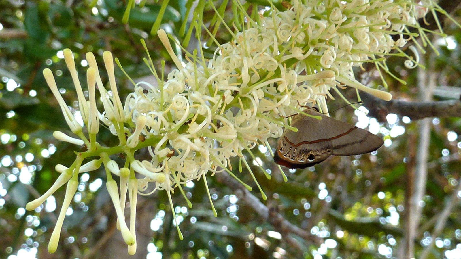 Roupala montana Aubl.